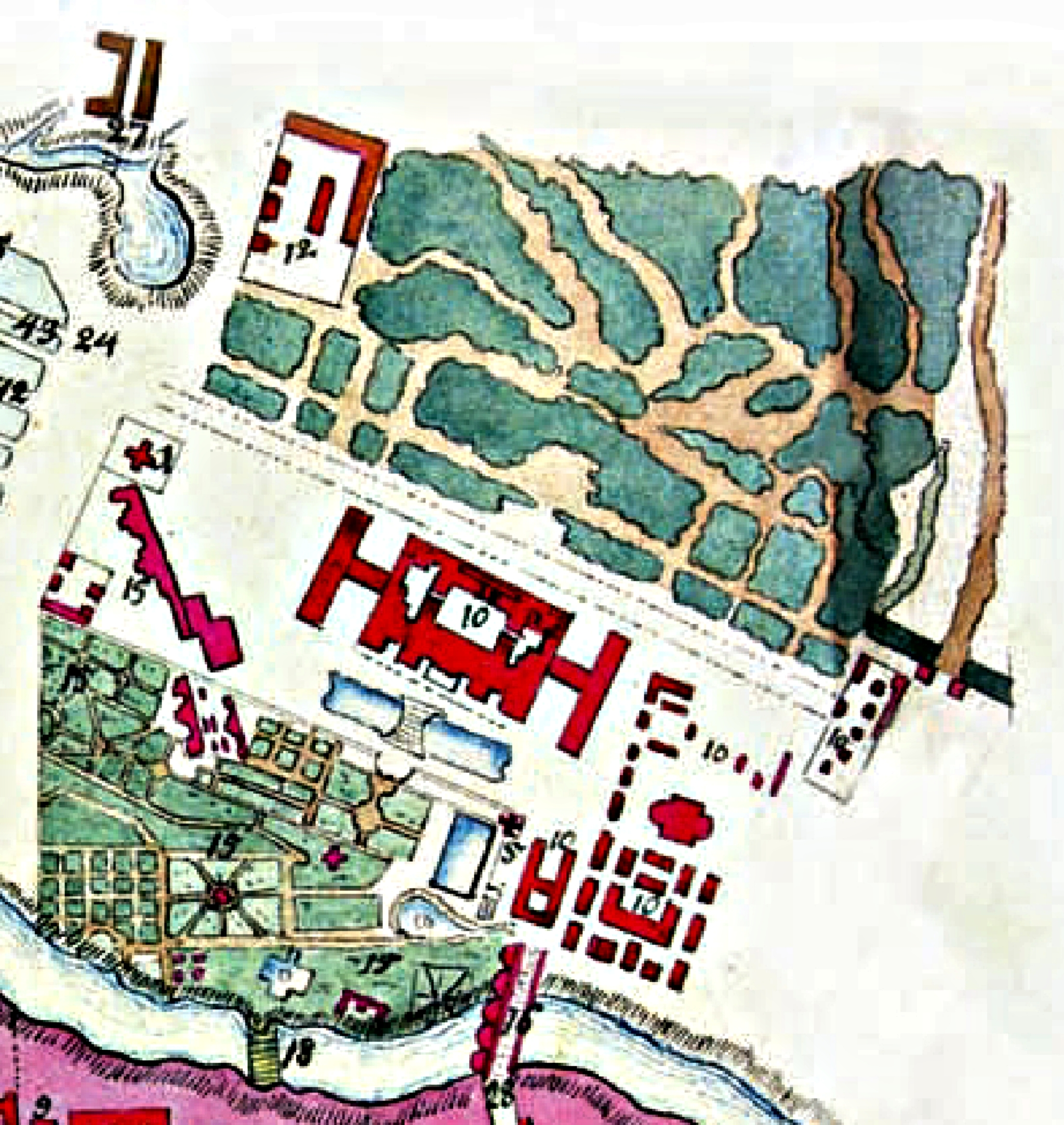 Екатерининский дворец (10) на Плане Лефортовской части Москвы 1804 года.